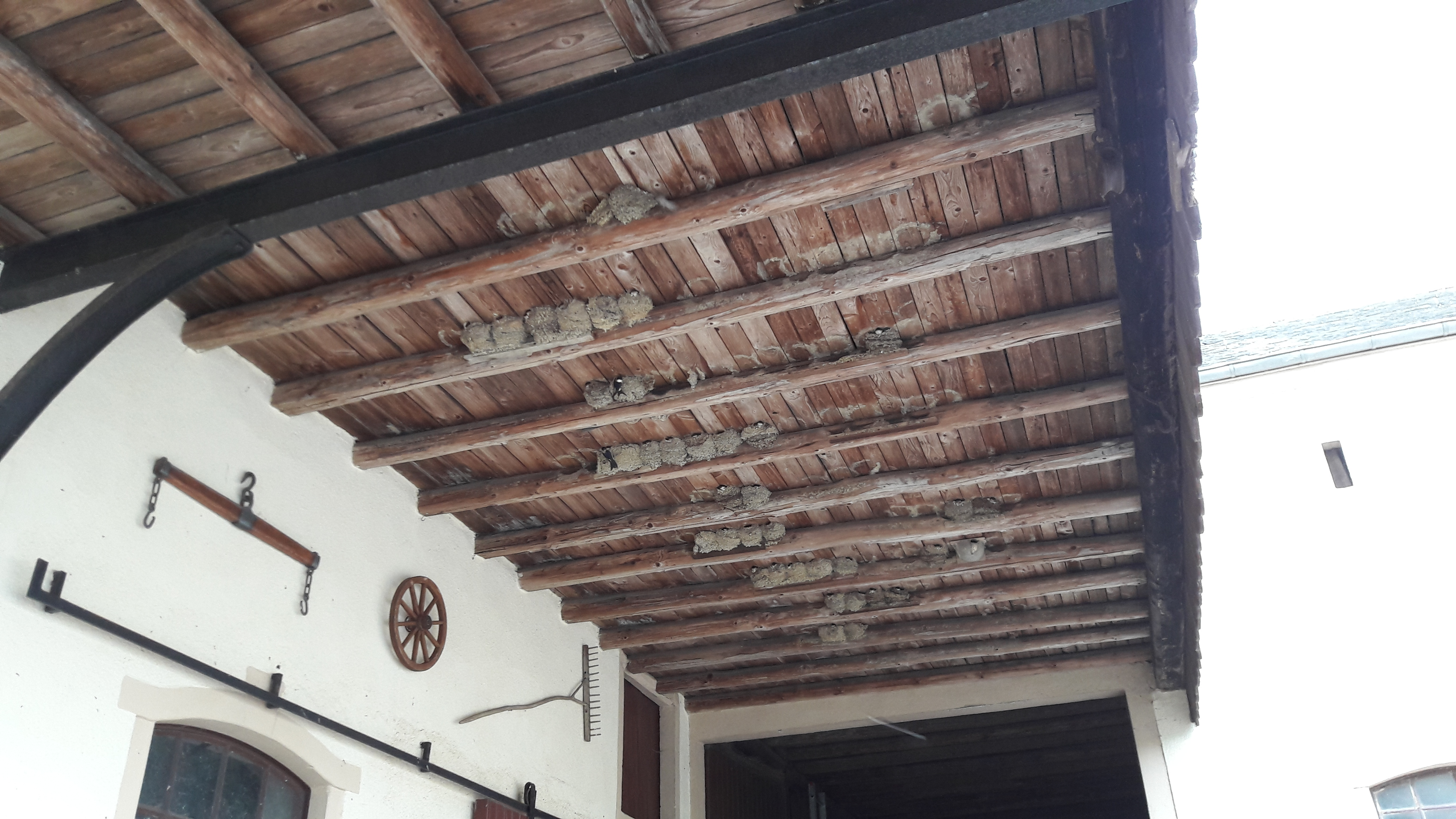 Schmuebele ënnert dem Iwwerdaach vun der Scheier vum Bauerenhaff an der Eech, Nr 2 zu Leideleng - Hausnimm: beim Styr, a Weltesch, a Staffels